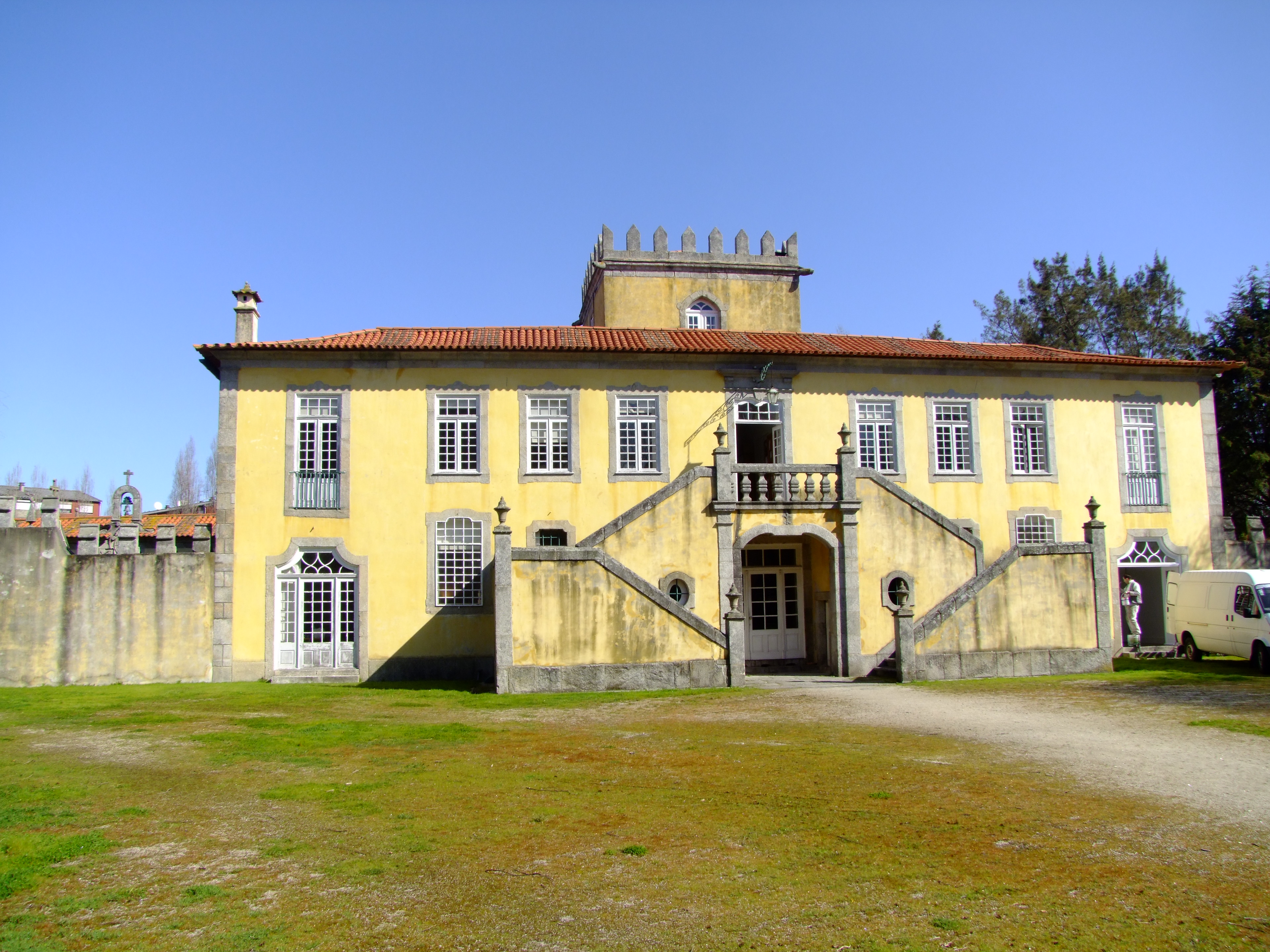 Casa de Ramalde , Ramalde Porto, Portugal